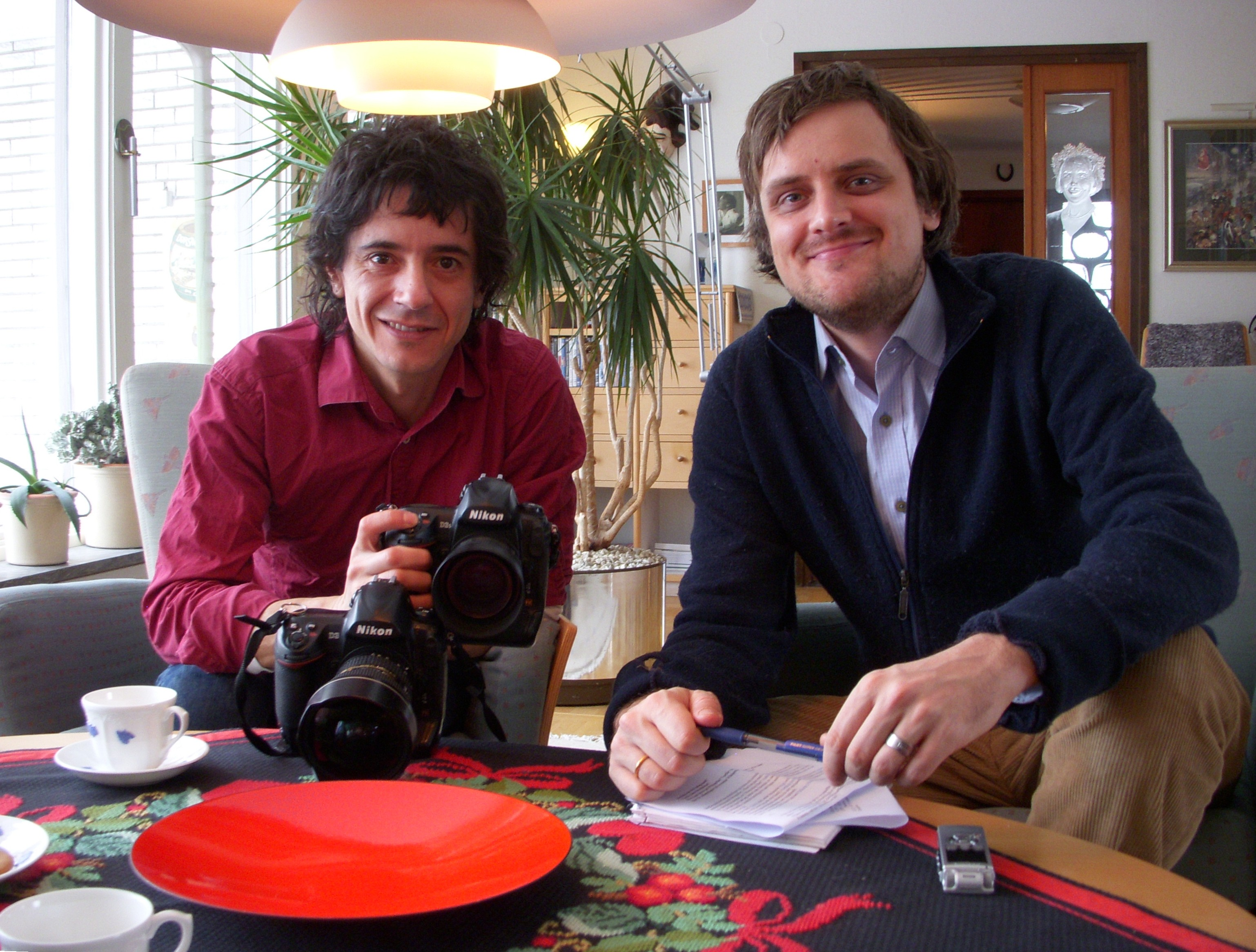 Frilansfotografen José Figueroa och journalisten Emil Arvidsson "Hemma hos" Holger Ellgaard